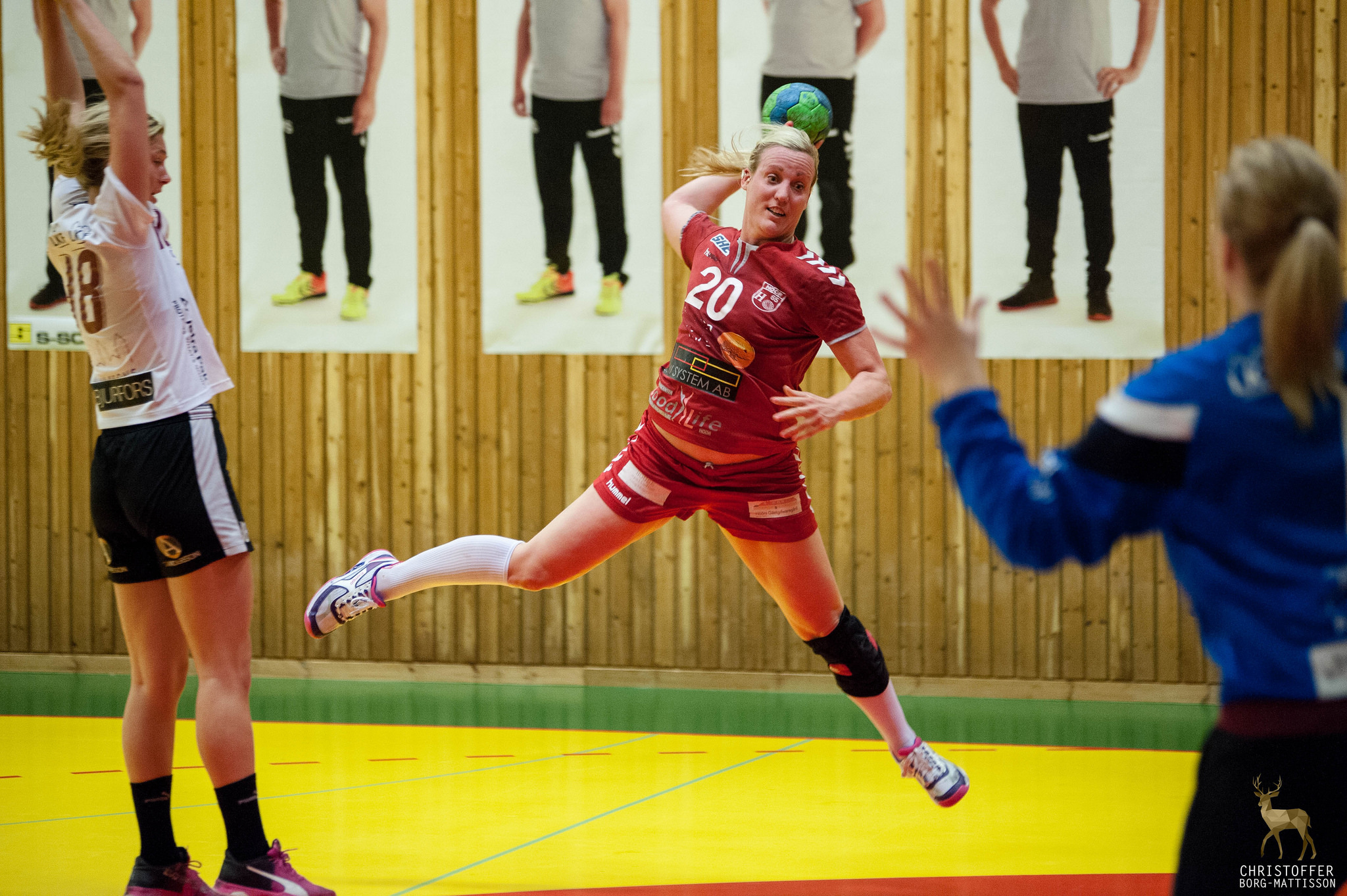 Anna Olsson i semifinalen mot LUGI 2017.